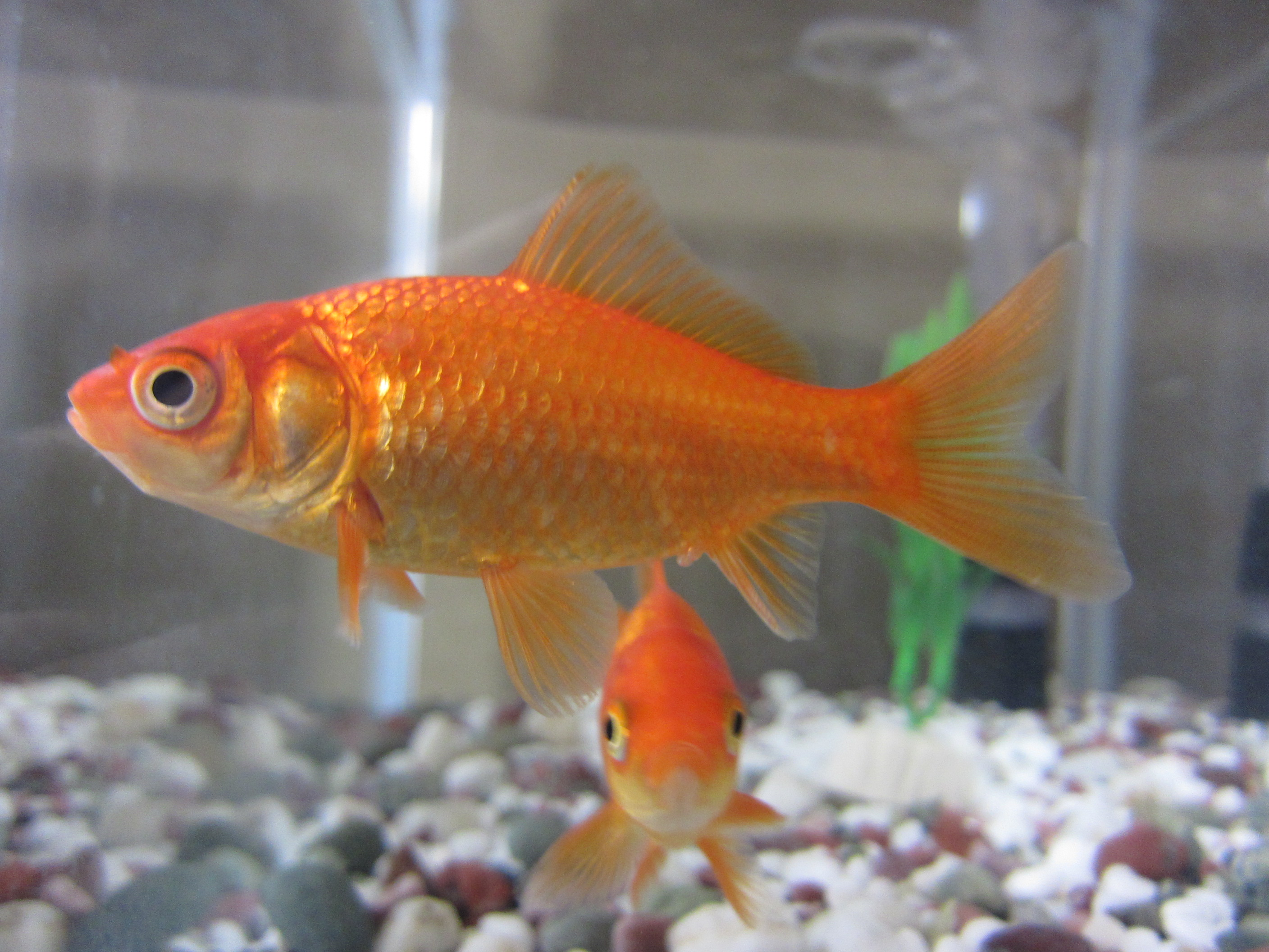 典型的なワキン